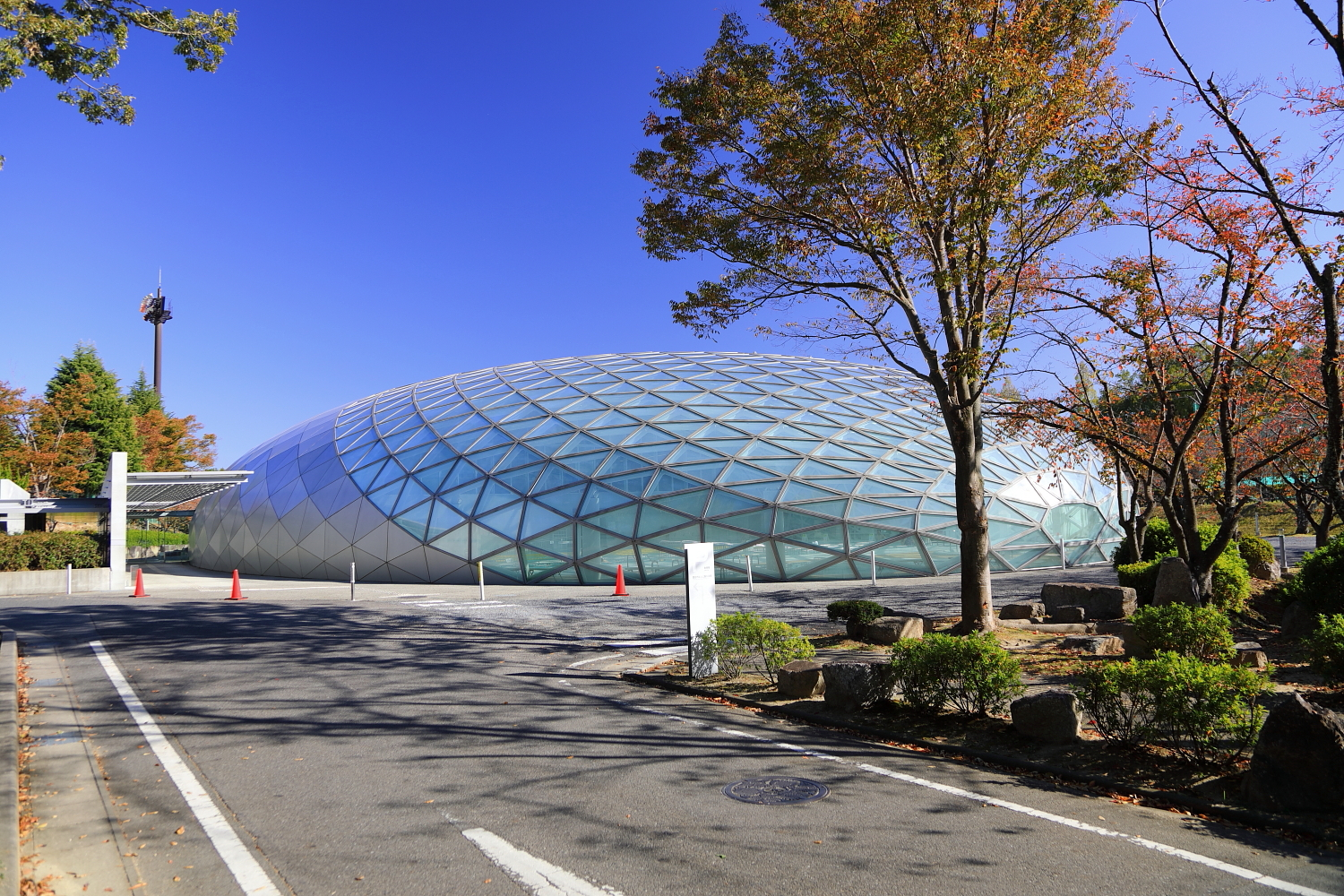 井上公園水泳場外観（豊田市井上町、2018年（平成30年）11月）